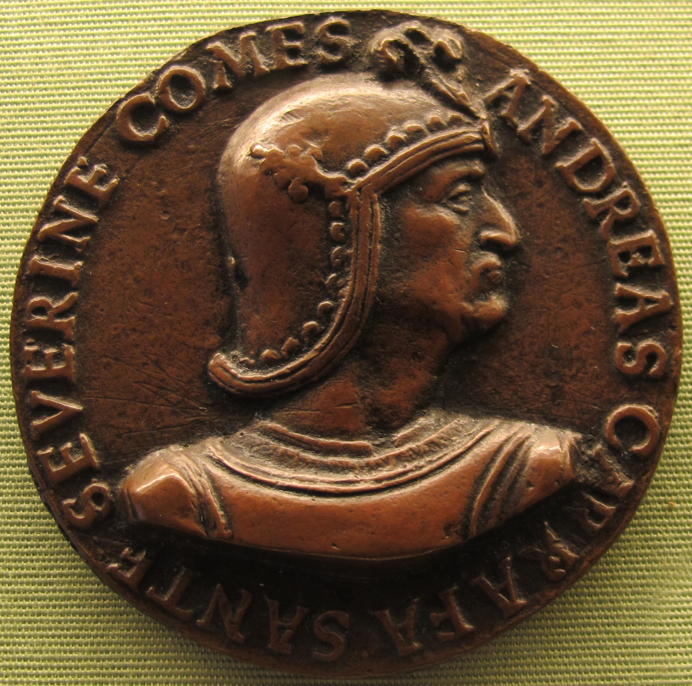 Artista napoletano, andrea caraffa conte di sanseverino, 1500 ca